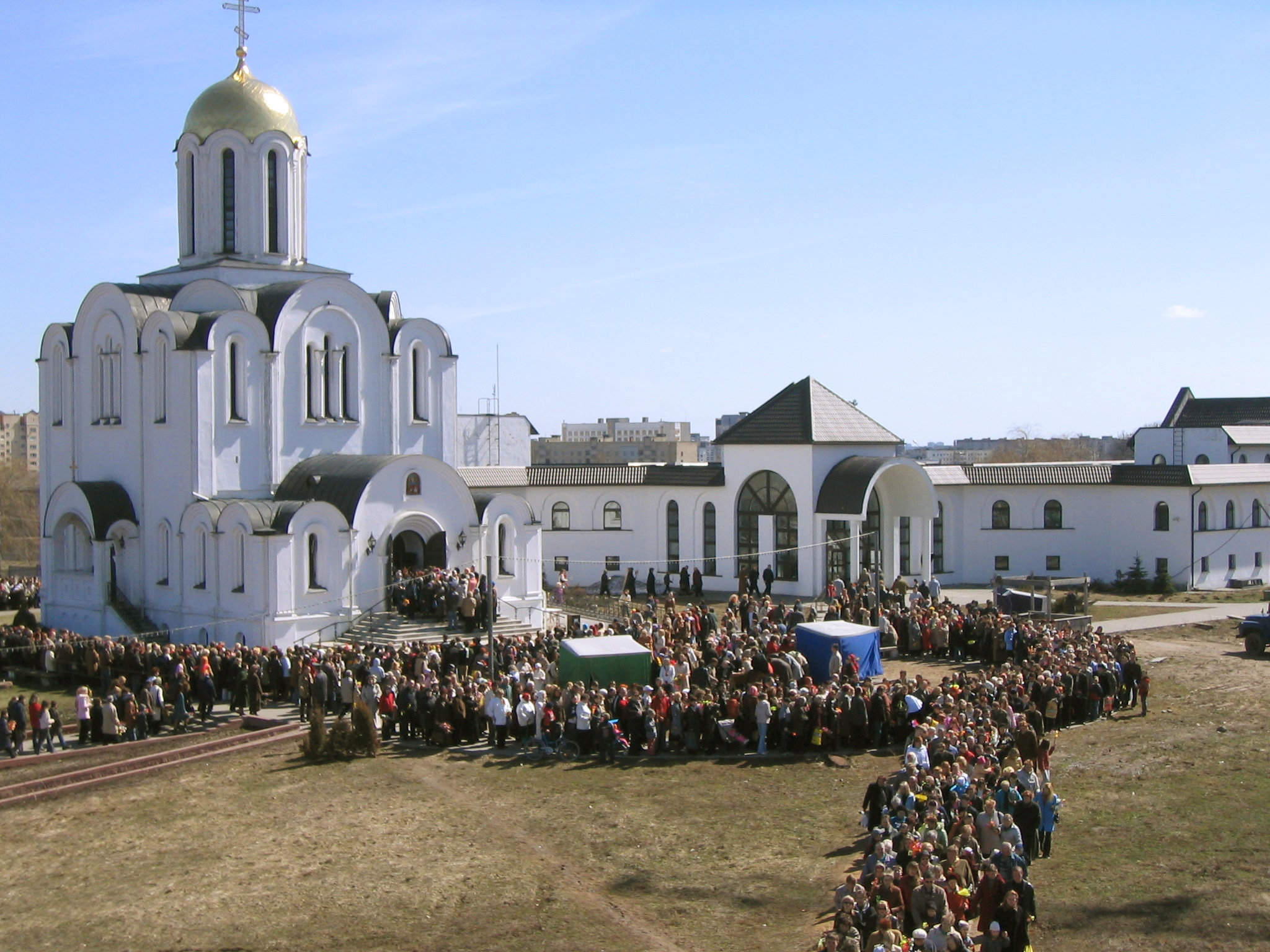 Евфросиниевская церковь прихода